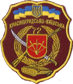 Нарукавний знак, 72 окрема механізована бригада